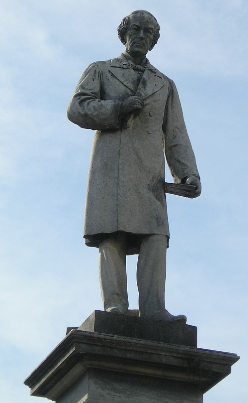 Monumento a Juan Bautista Alberdi, cementerio de la Recoleta, Buenos Aires, Argentina. En este lugar descansaban los restos del escritor y político argentino, luego de haber sido repatriados desde Francia, en 1889, hasta su posterior traslado, en 1991, al Palacio Gubernamental de la Provincia de Tucumán.